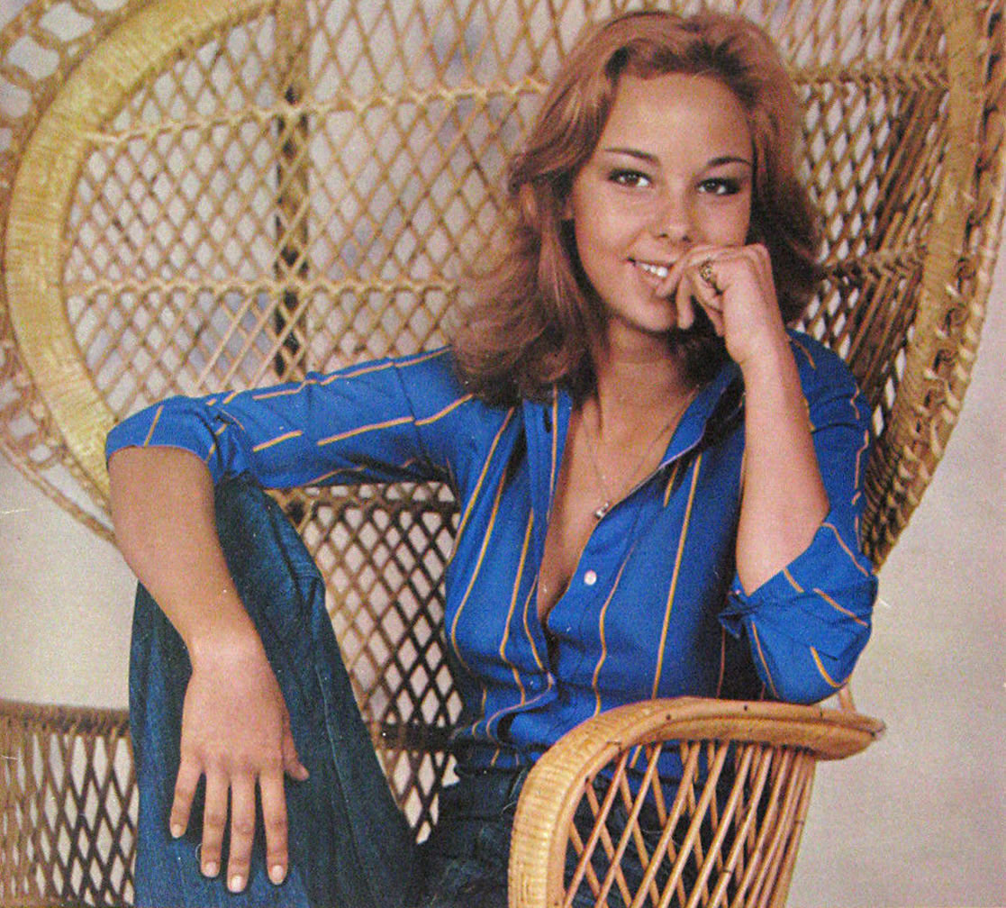 Italian actress Claudia Marsani, circa 1975.